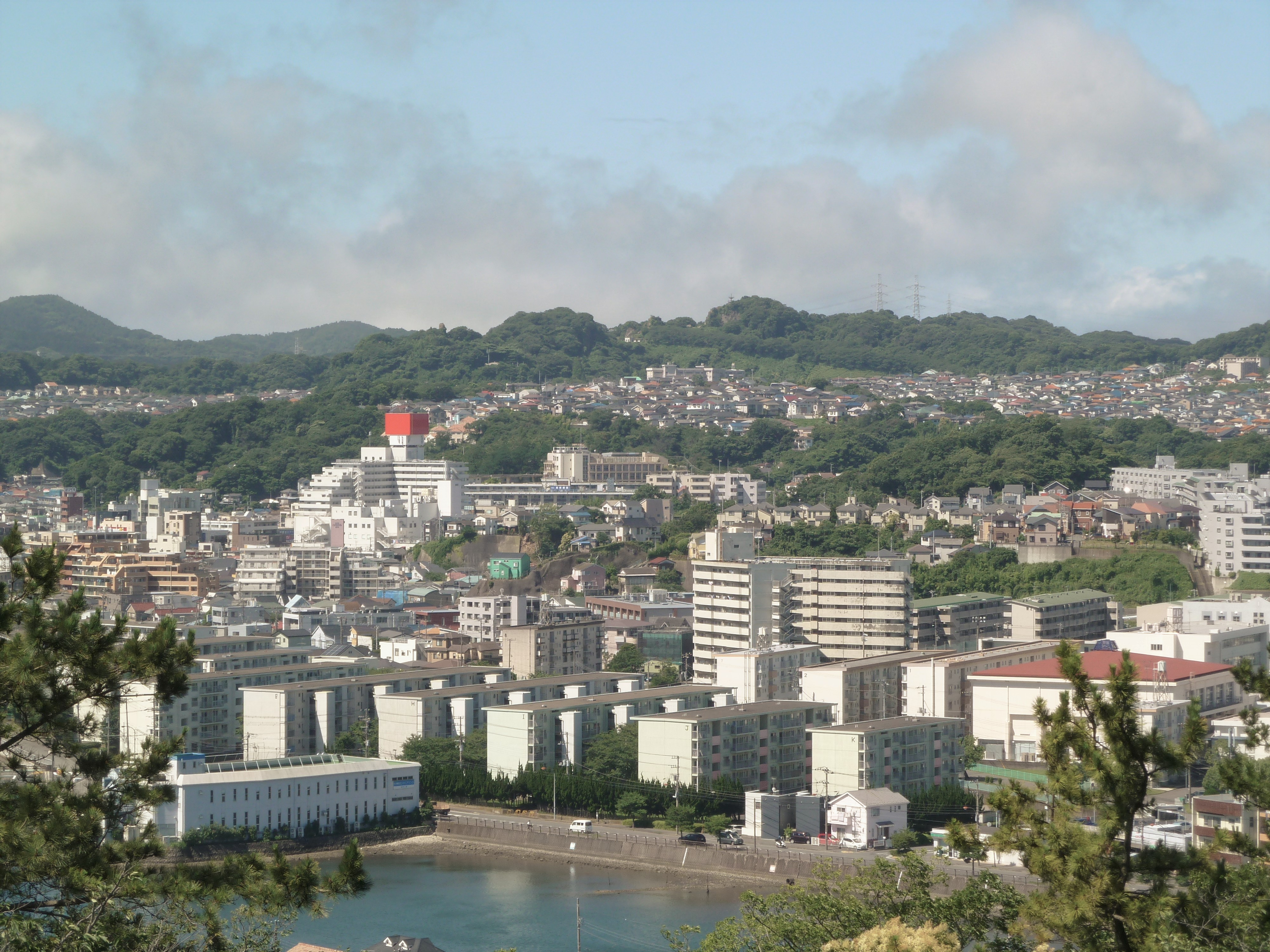 野島公園展望台から南西に望む鷹取山(神奈川県横浜市・横須賀市)